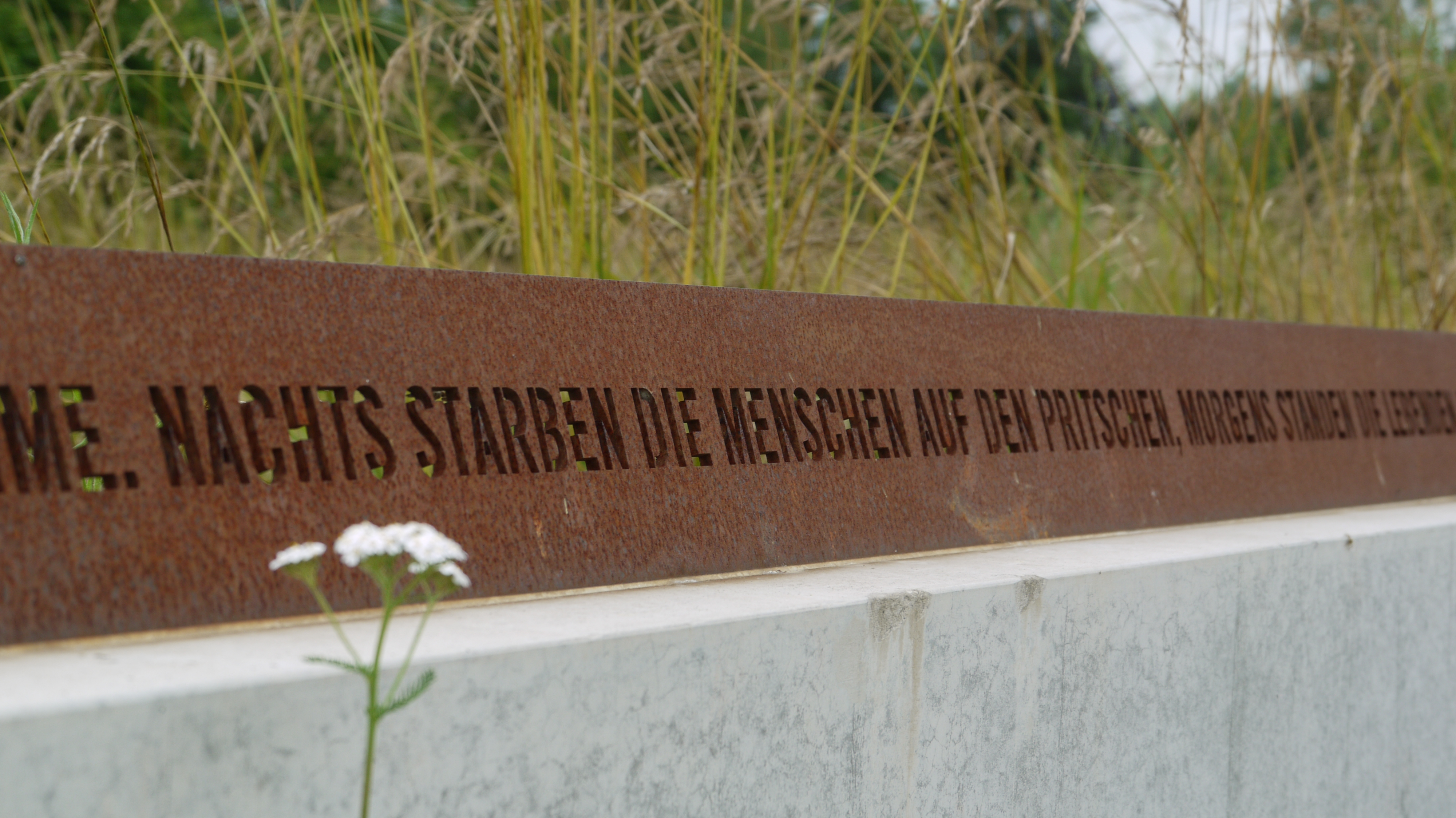 Kunstwerk "Laute Stille"am Gedenkort Zwangsarbeiterlager "Saure Wiese" Bochum